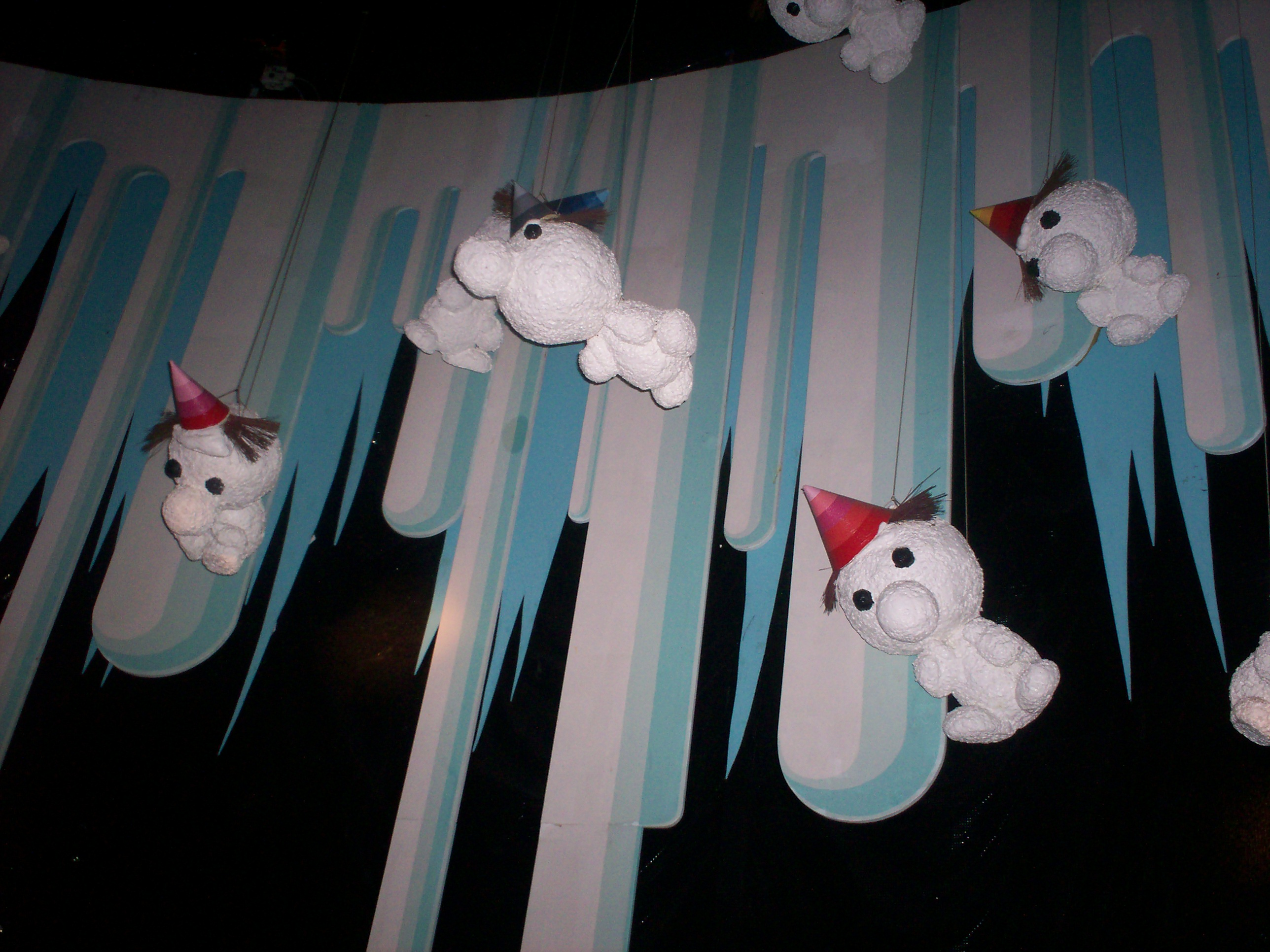 IJspoppetjes in Carnaval Festival